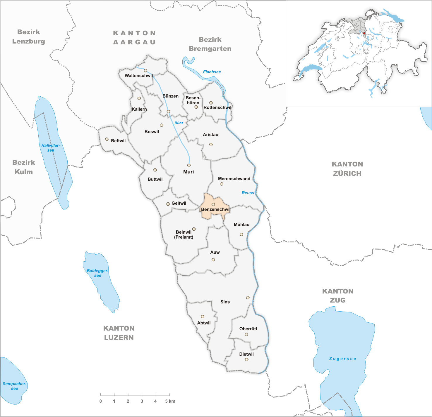 Municipality Benzenschwil